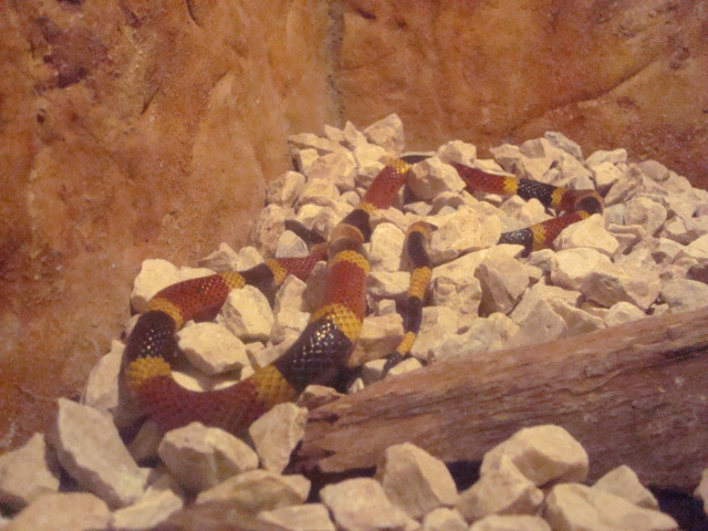 Coral costarricense (Micrurus mosquitensis) en el serpentario de La Paz Gardens and Waterfalls, Vara Blanca, Costa Rica.